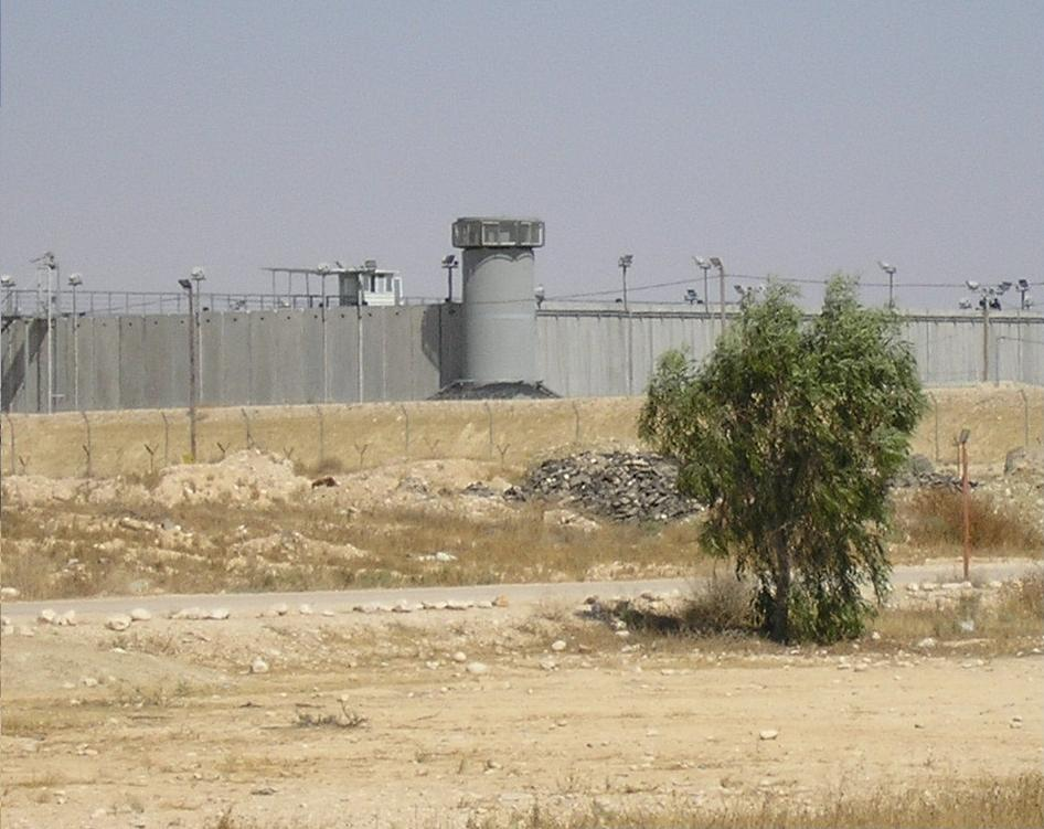 Ktzi'ot Prison